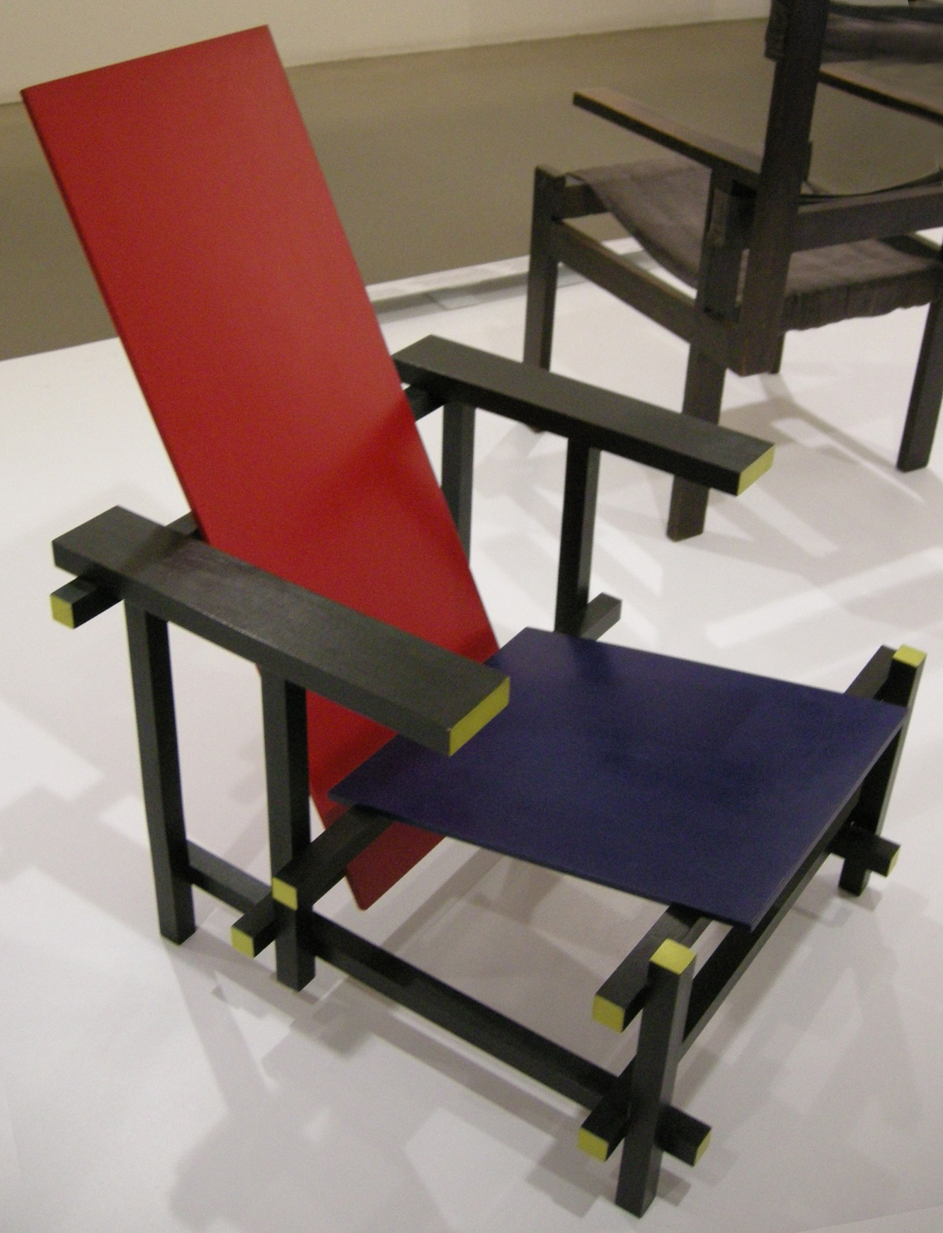 Ngv design, gerrit rietveld, red-blue chair 1917